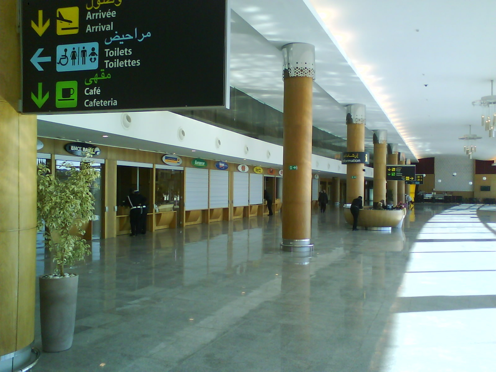 rabat airrport